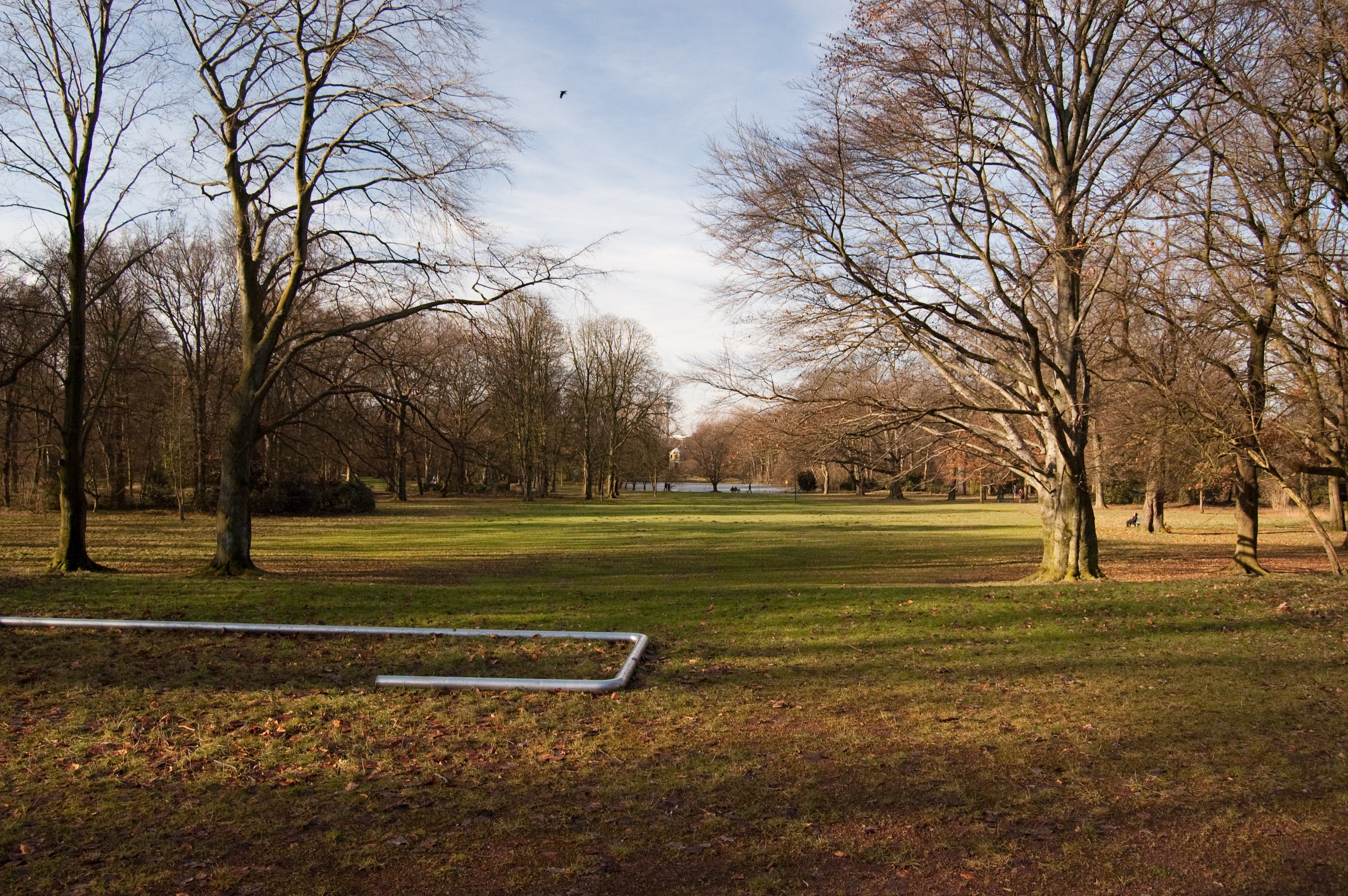 Volksgarten